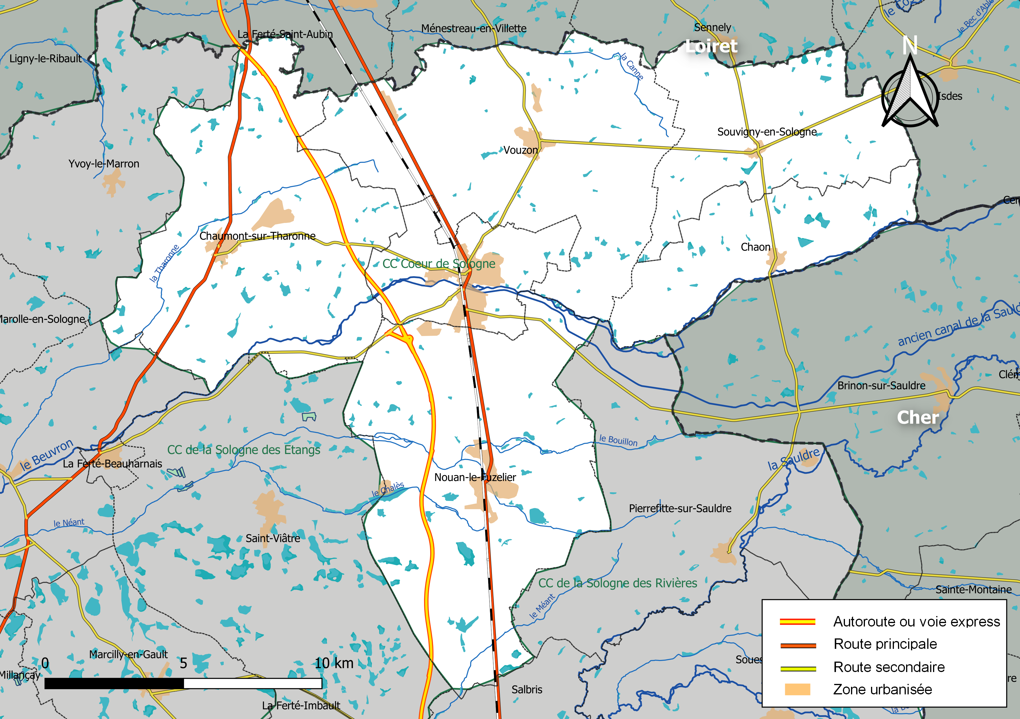 Carte de la communauté de communes Cœur de Sologne, département de Loir-et-Cher, France. Composition au 1er janvier 2019.